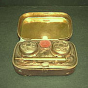 encrier de voyage avec essuie-plume